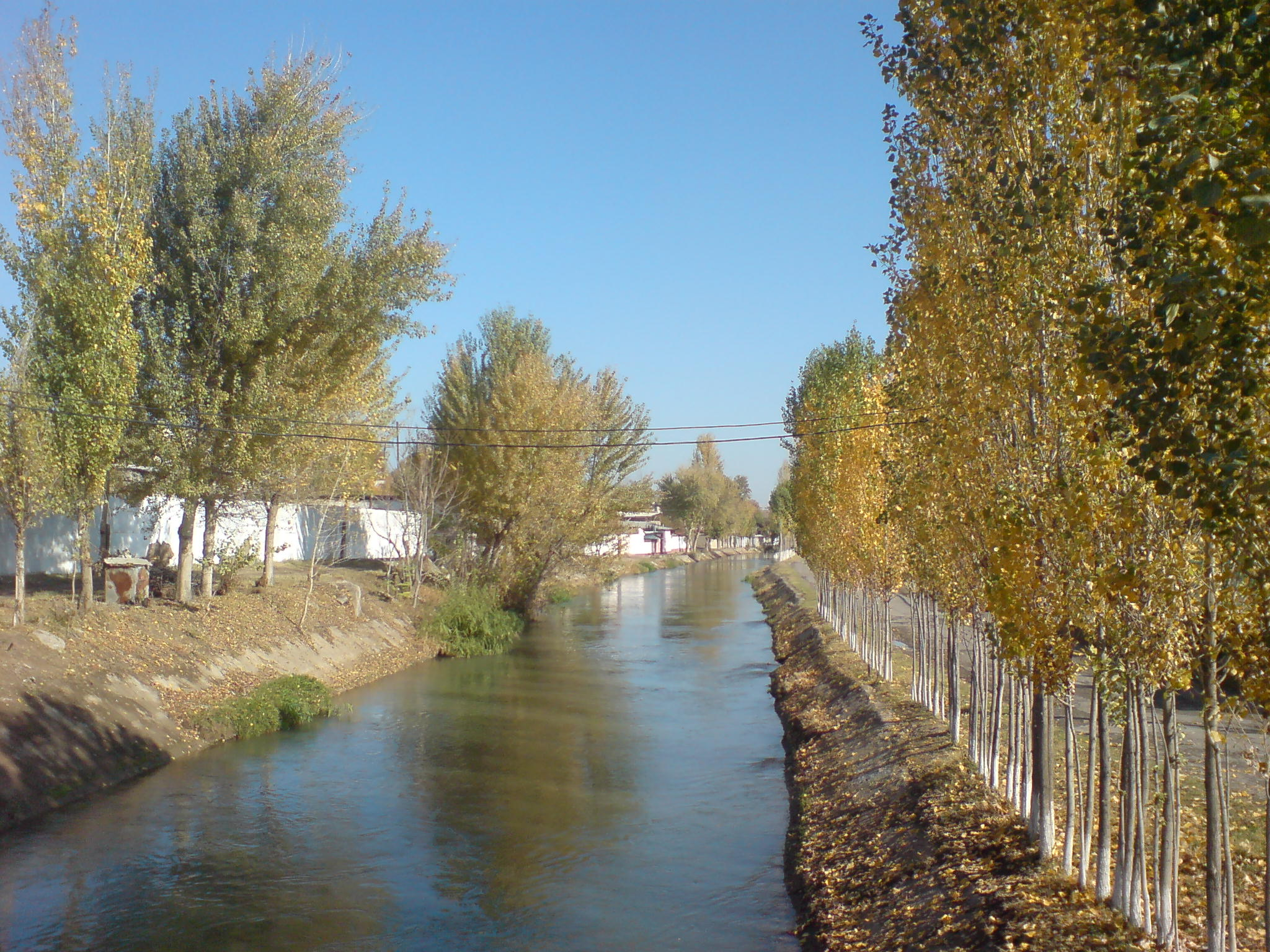 Канал Джун в районе городища Шаштепа (г. Ташкент)